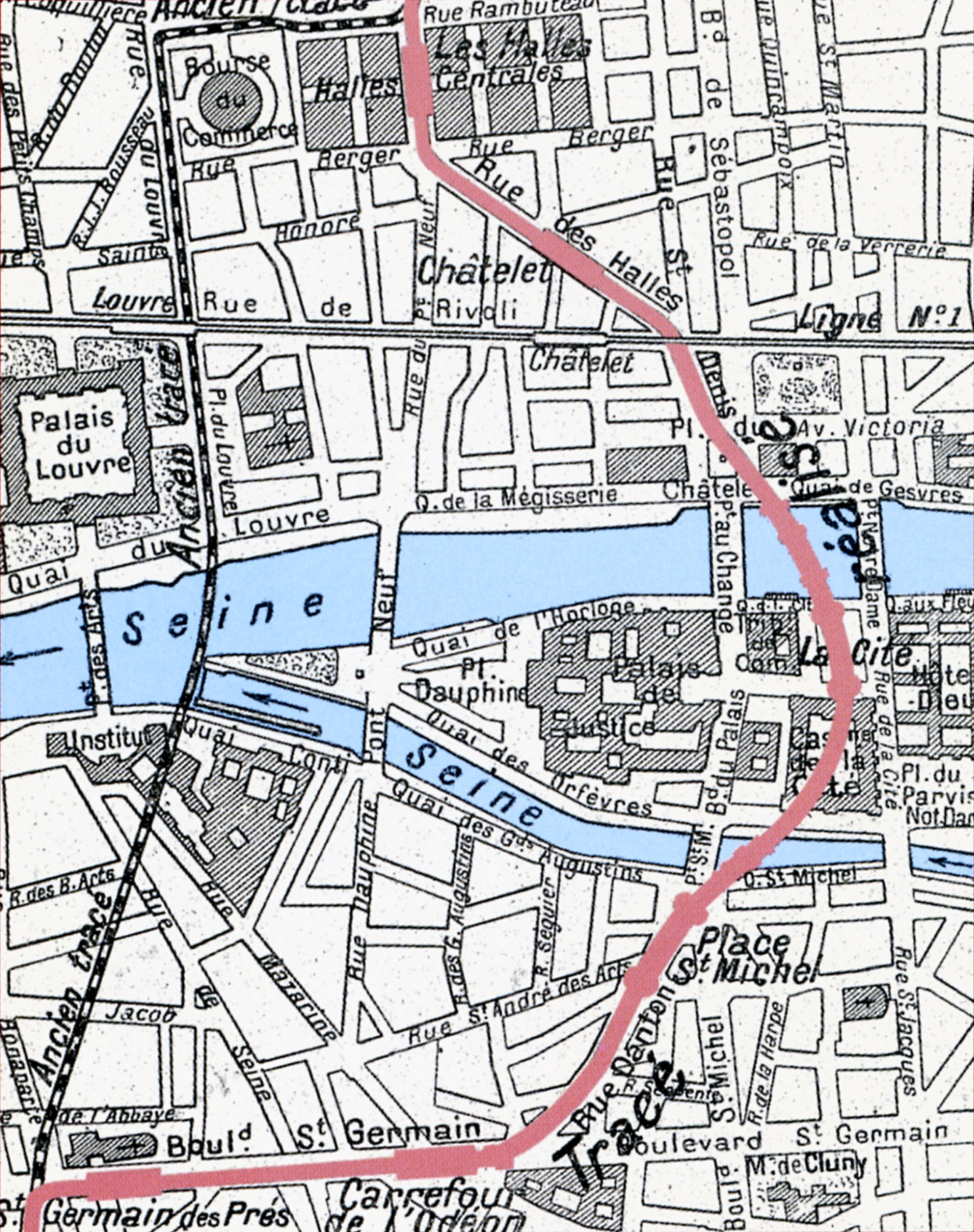 Tracé dans l'Ile de la Cité de la ligne 4 du métro de Paris, France.